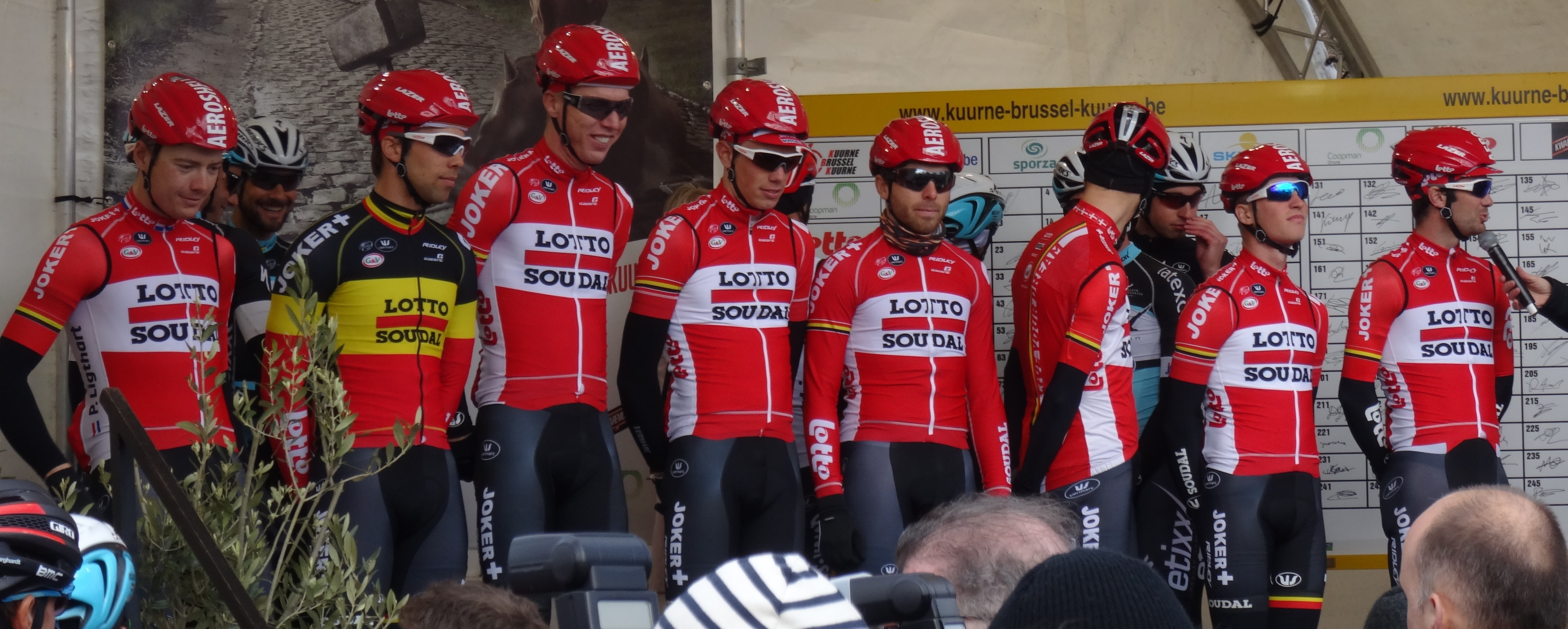 Reportage réalisé le dimanche 1er mars à l'occasion du départ et de l'arrivée de Kuurne-Bruxelles-Kuurne 2015 à Kuurne, Belgique.